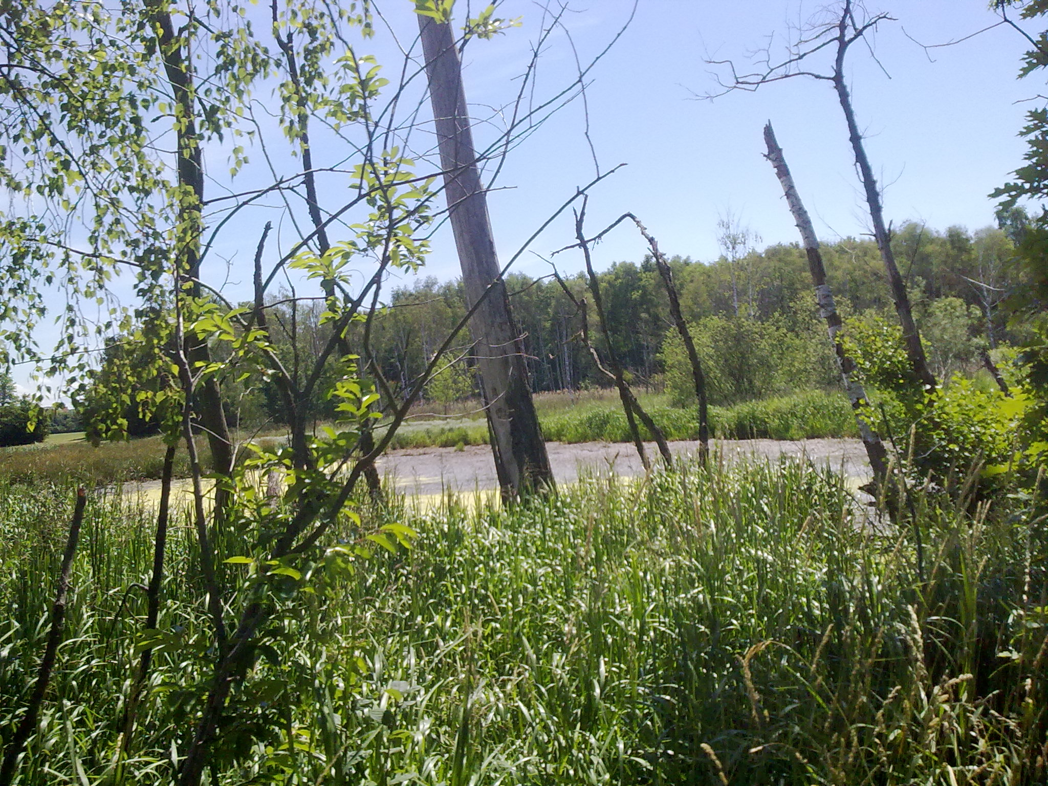 Naturschutzgebiet „Fuchsberg“ in der Stadt Cottbus, Brandenburg, Moor